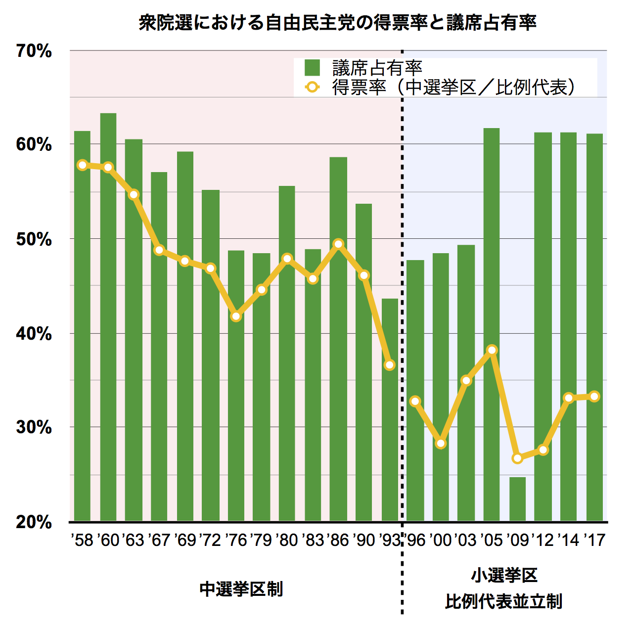 衆議院選挙における自民党の得票率と議席占有率